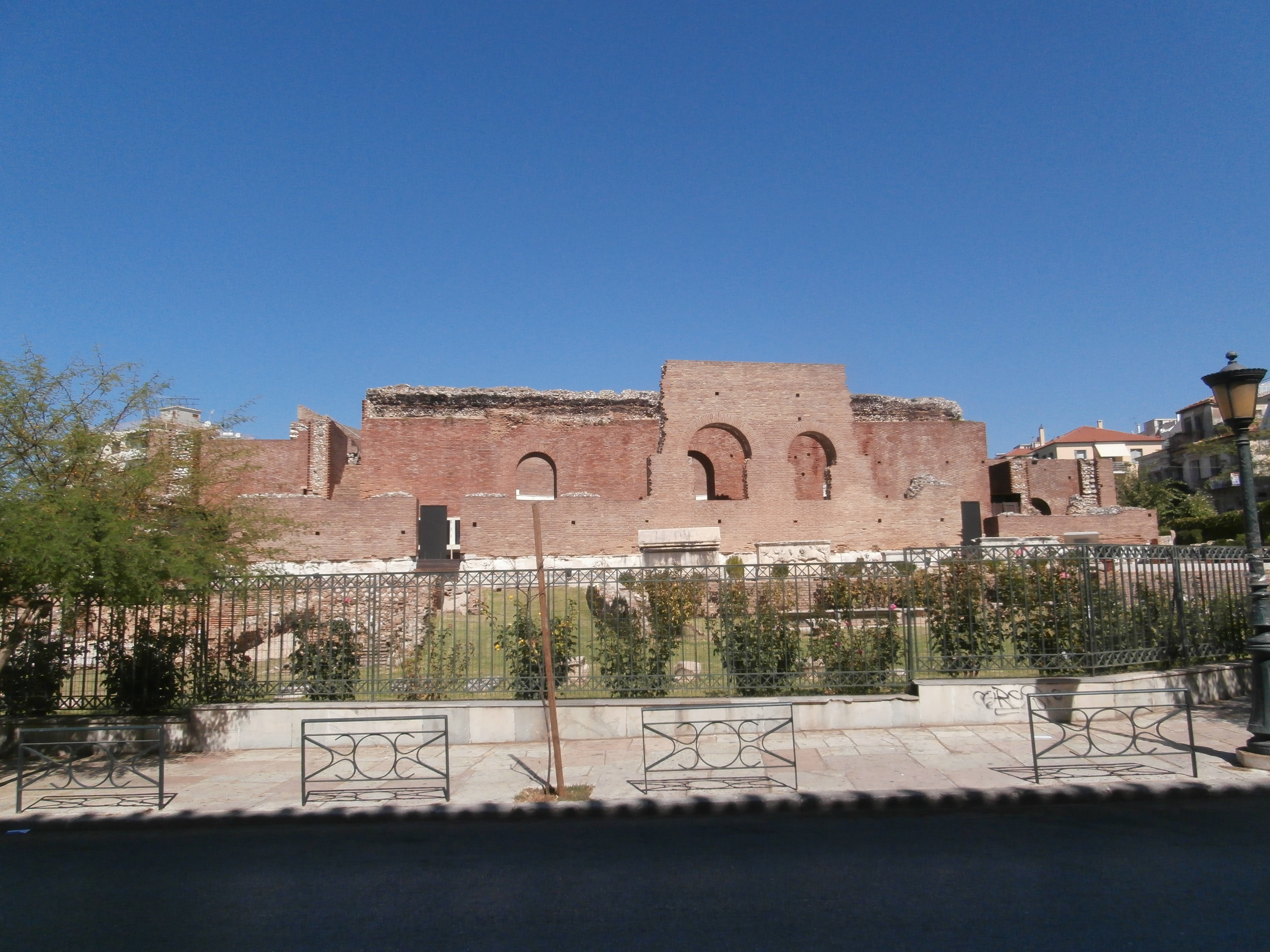 Ρωμαϊκό Ωδείο Πατρών«Ρωμαϊκό Ωδείο Πατρών»